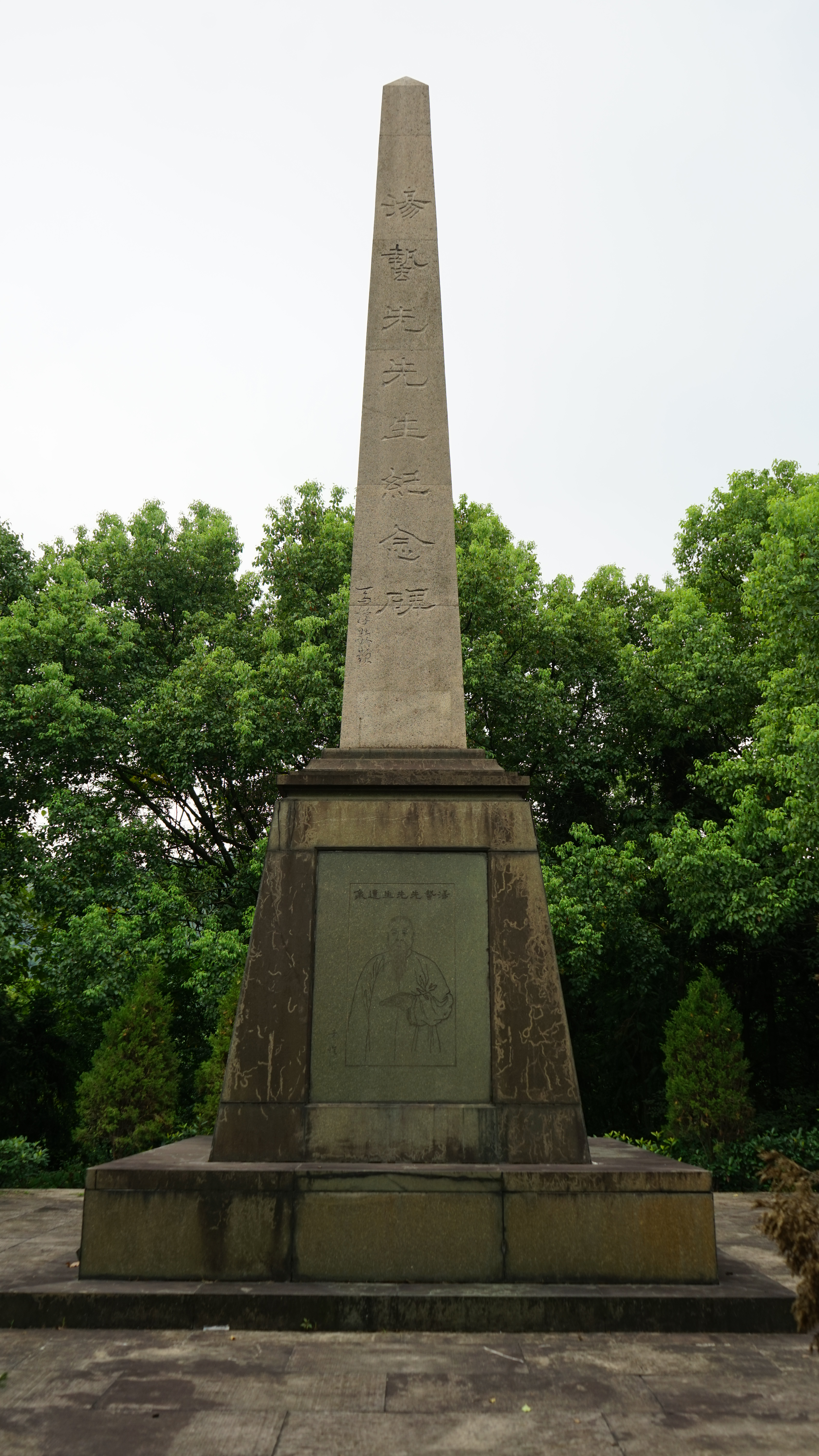 中文（中国大陆）: 汤蛰先纪念碑 杭州市文物保护单位